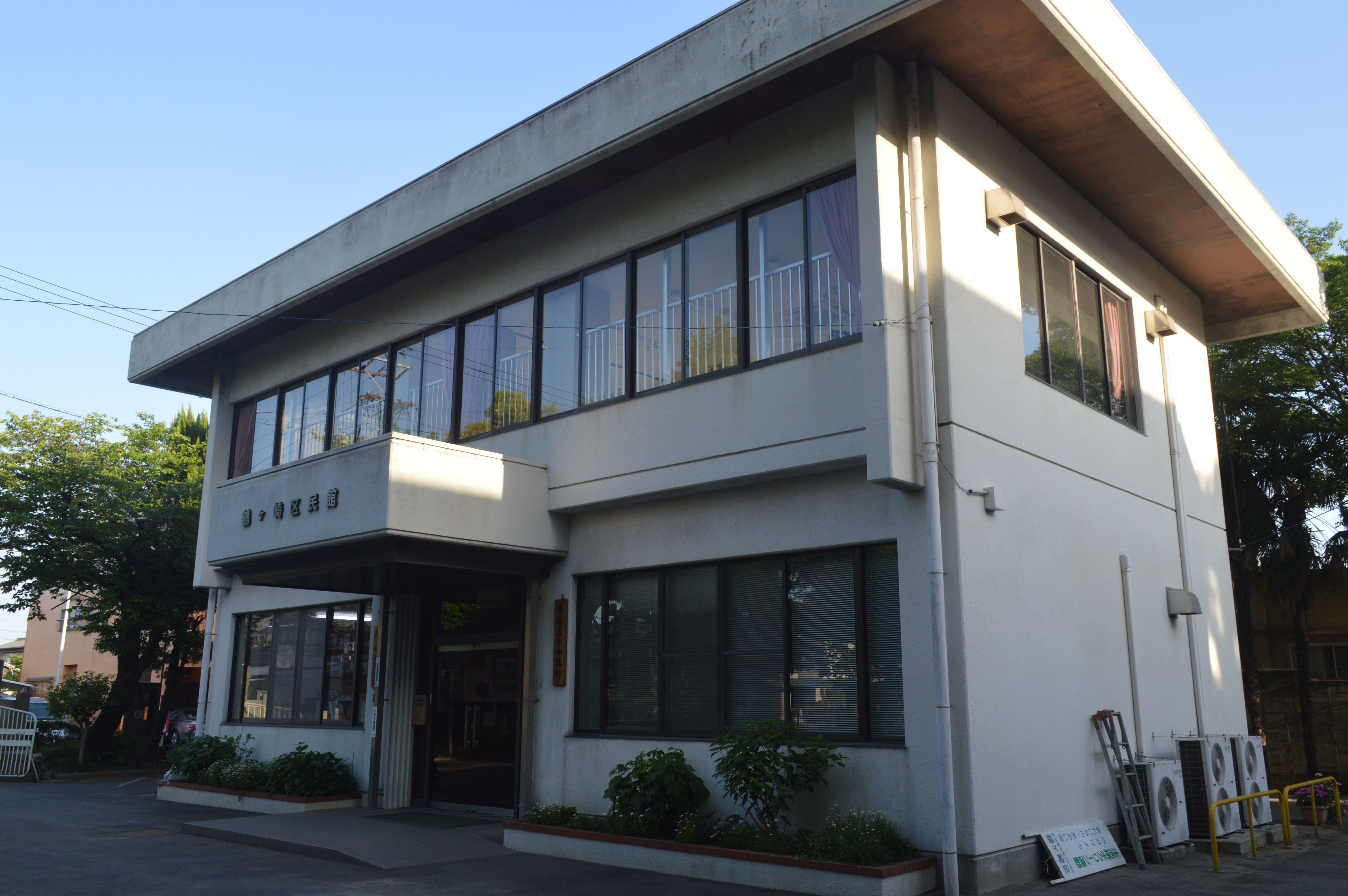 愛知県碧南市の鶴ヶ崎区民館。